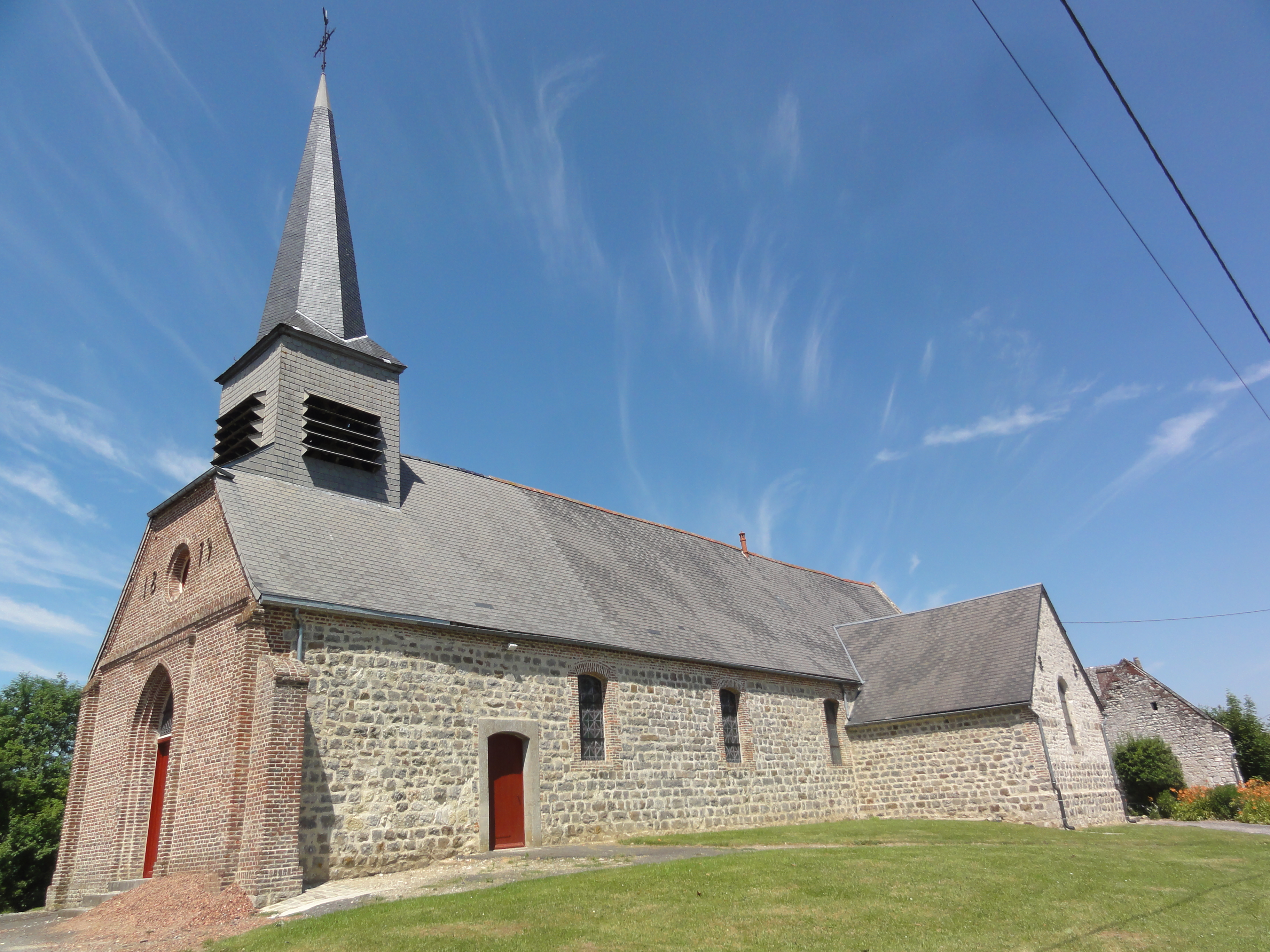 Sons-et-Ronchères (Aisne) église